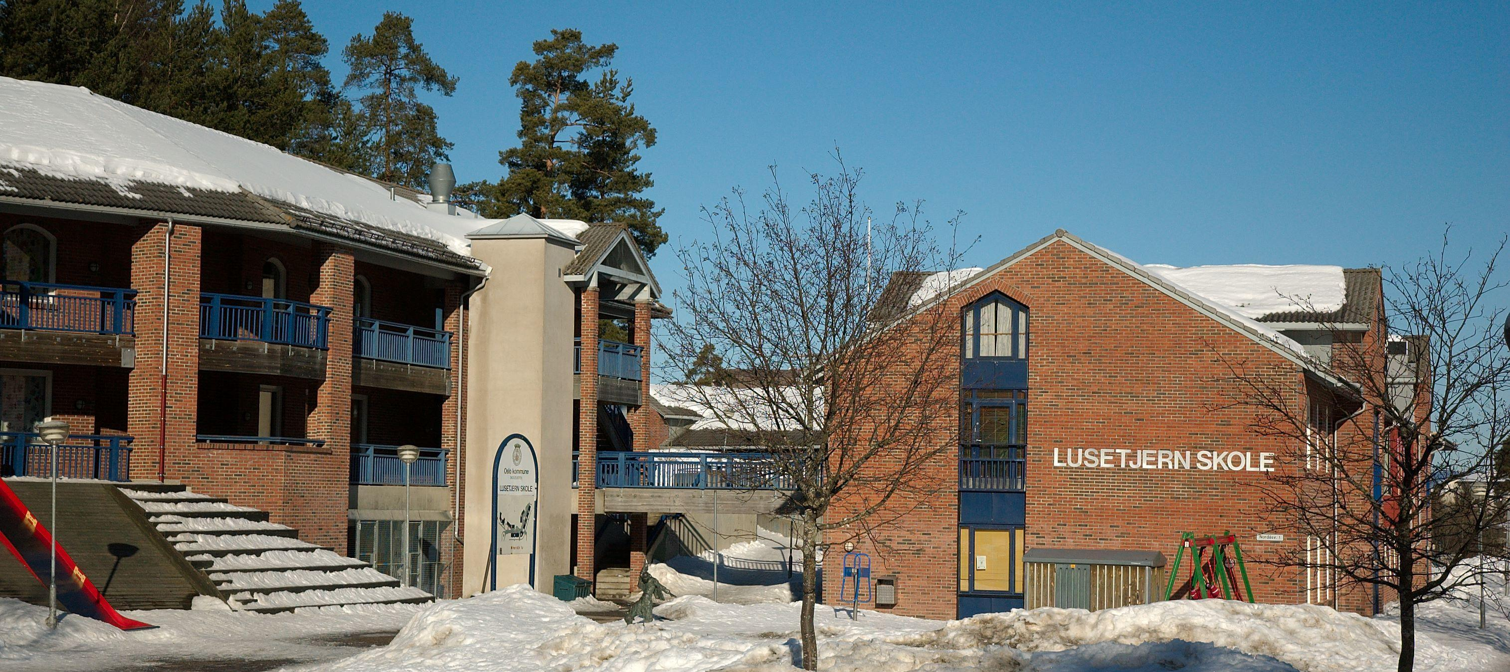 Lusetjern skole på Holmlia i Oslo